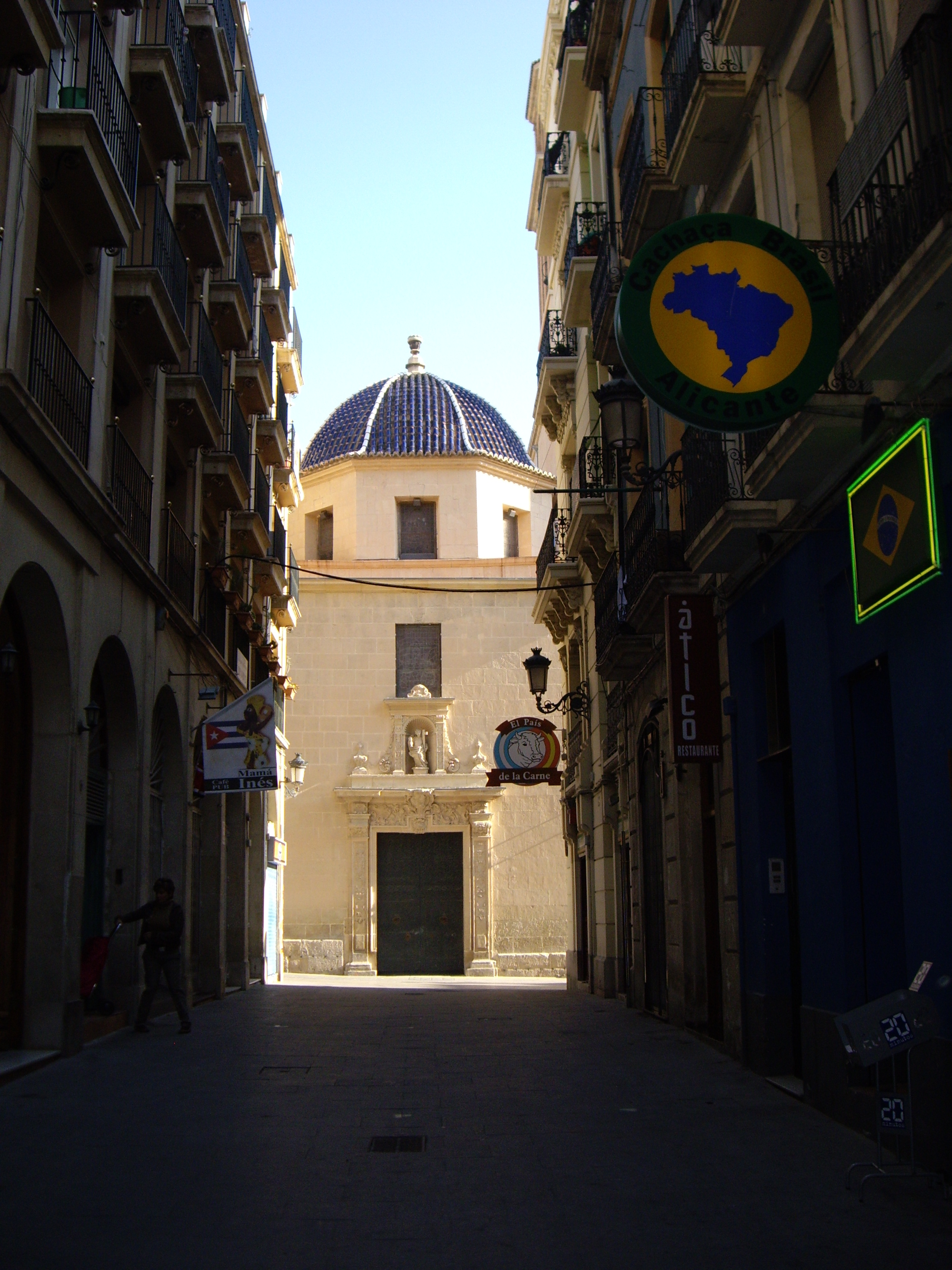 sant Nicolau